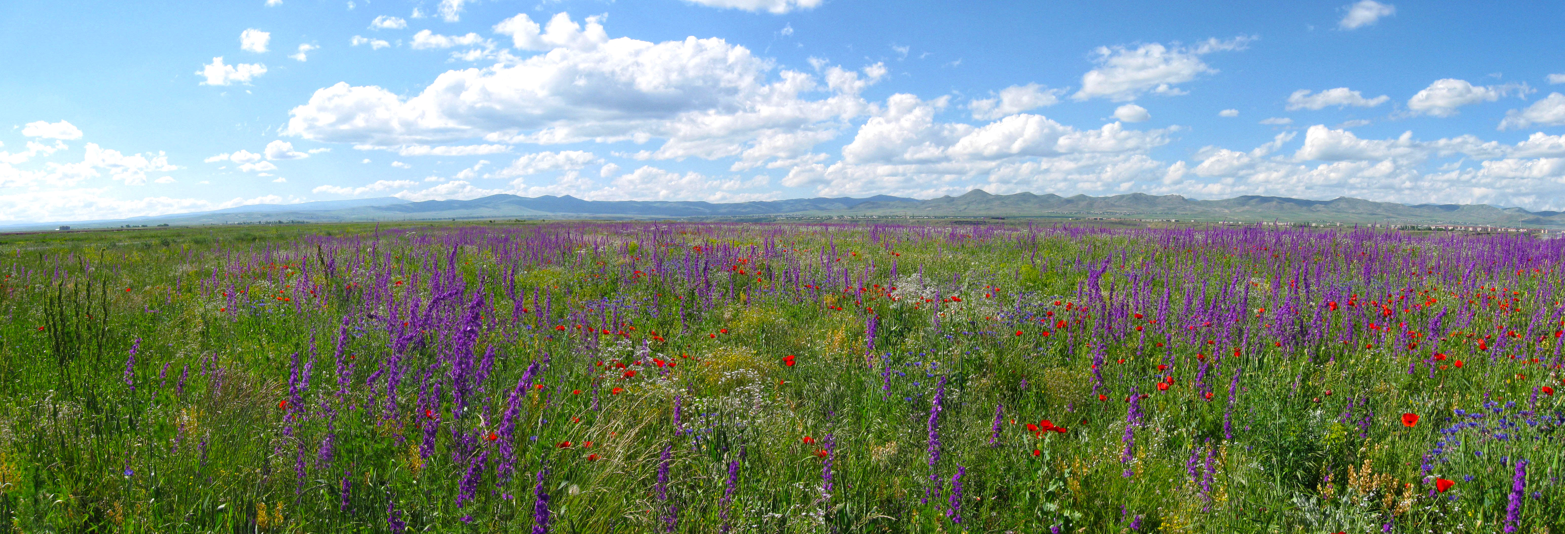 Շիրակի մարզի ալպյան մարգագետինները